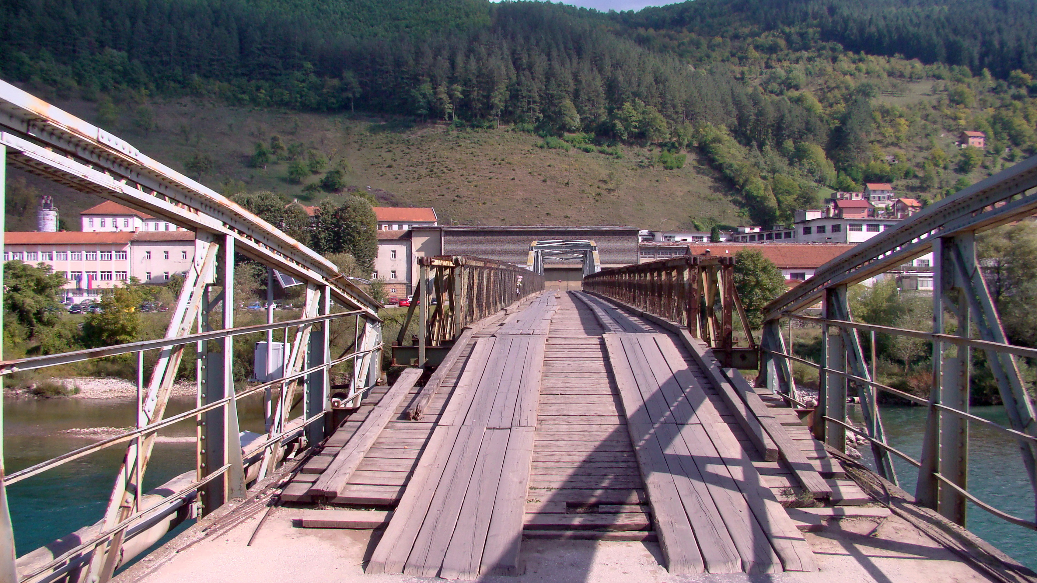 Српски (ћирилица): Жељезни мост принца Карла This image was uploaded as part of Trace of Soul 2016.